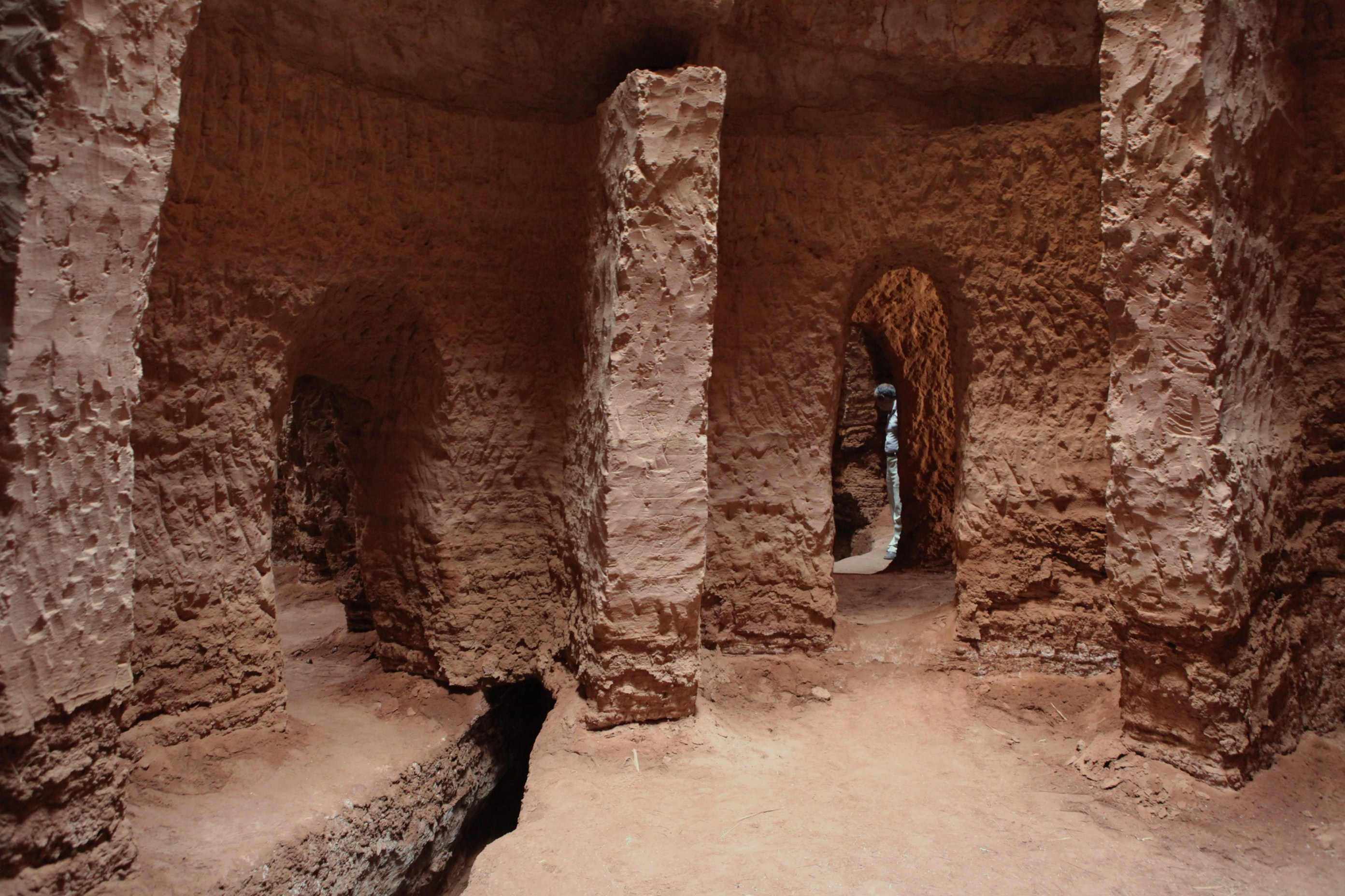 Qanat